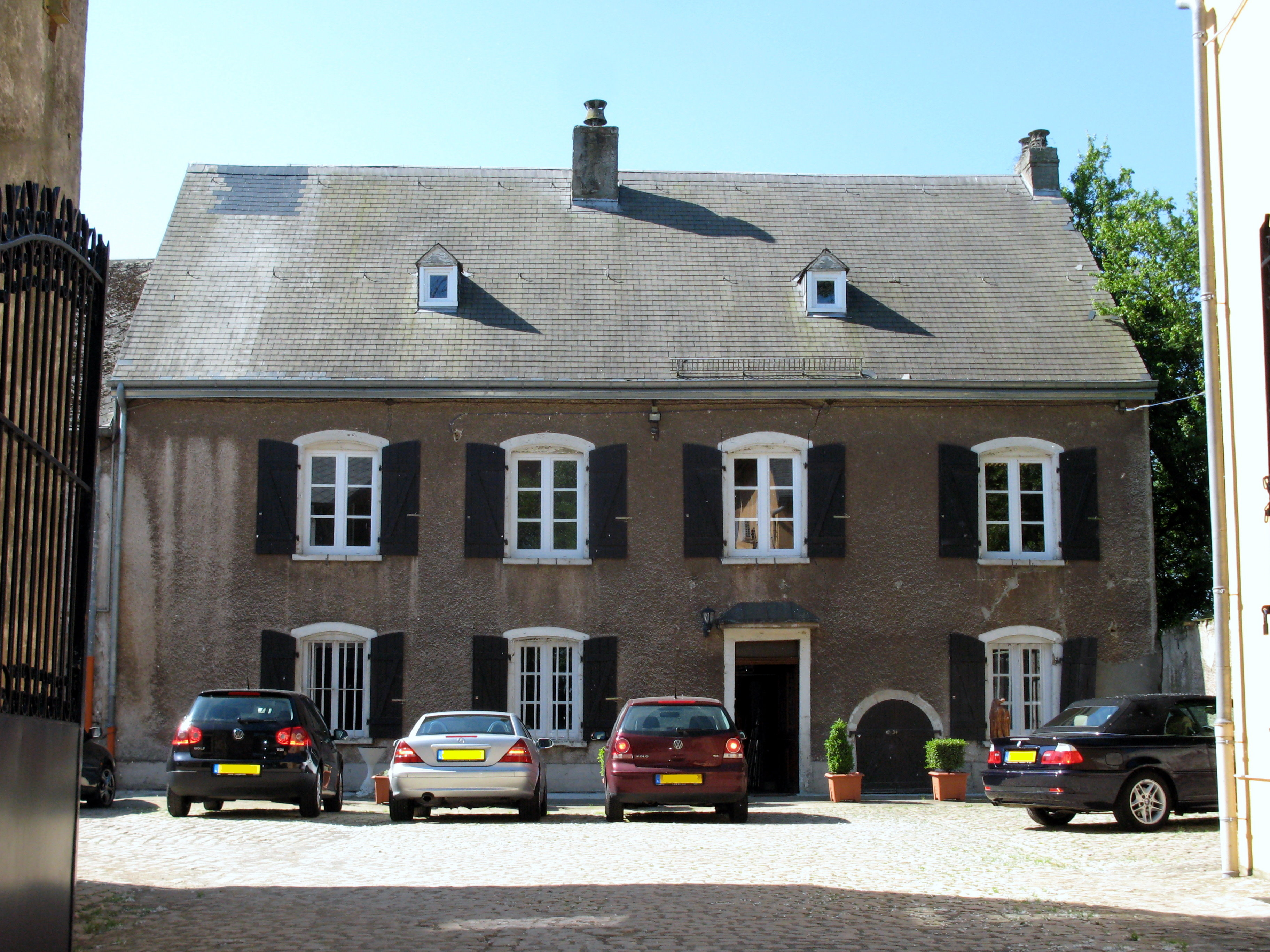 Den Dumongshaff am Juni 2009